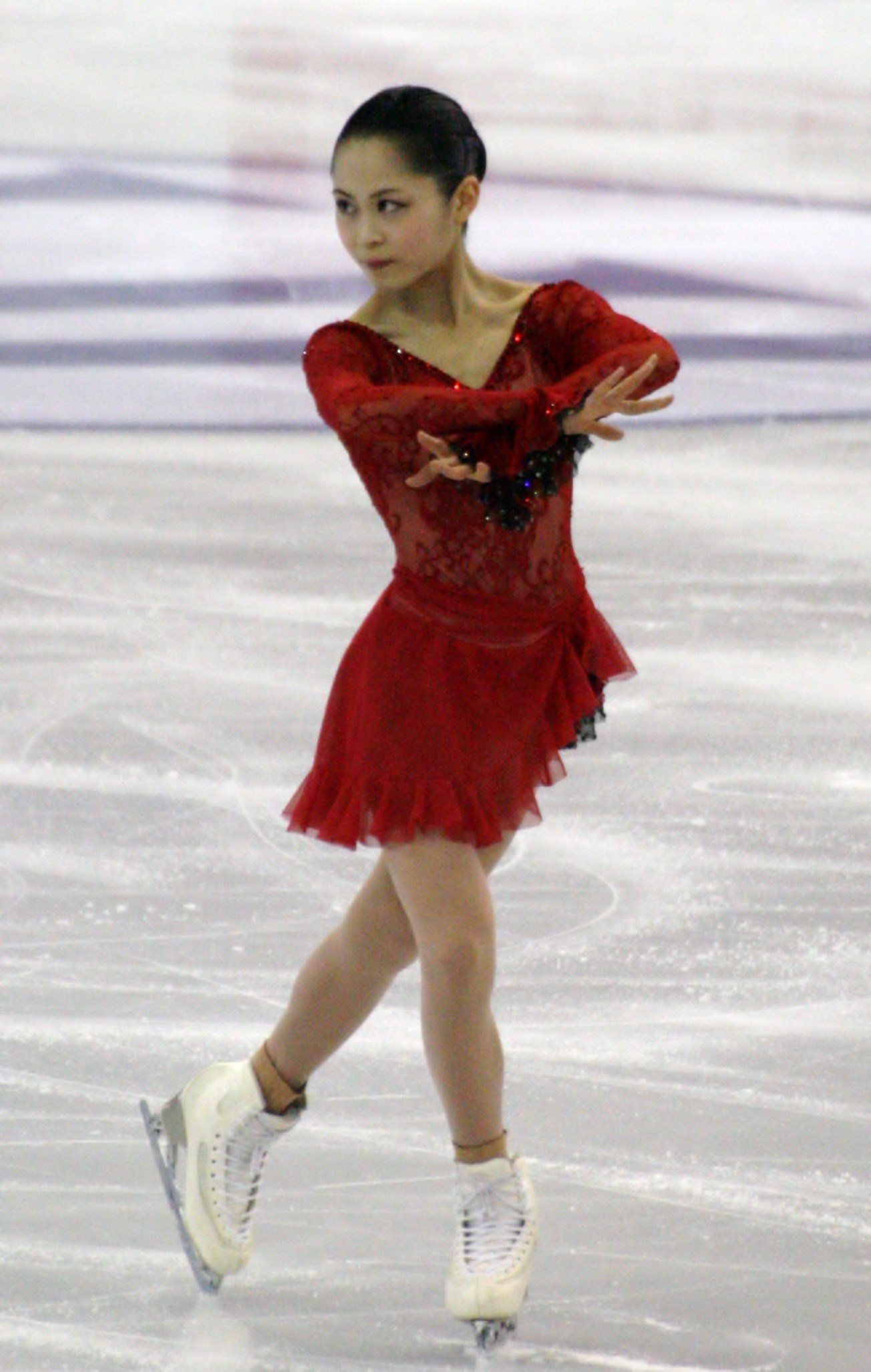 Сатоко Мияхара (Япония) на финале Гран-при по фигурному катанию 2015-2016.